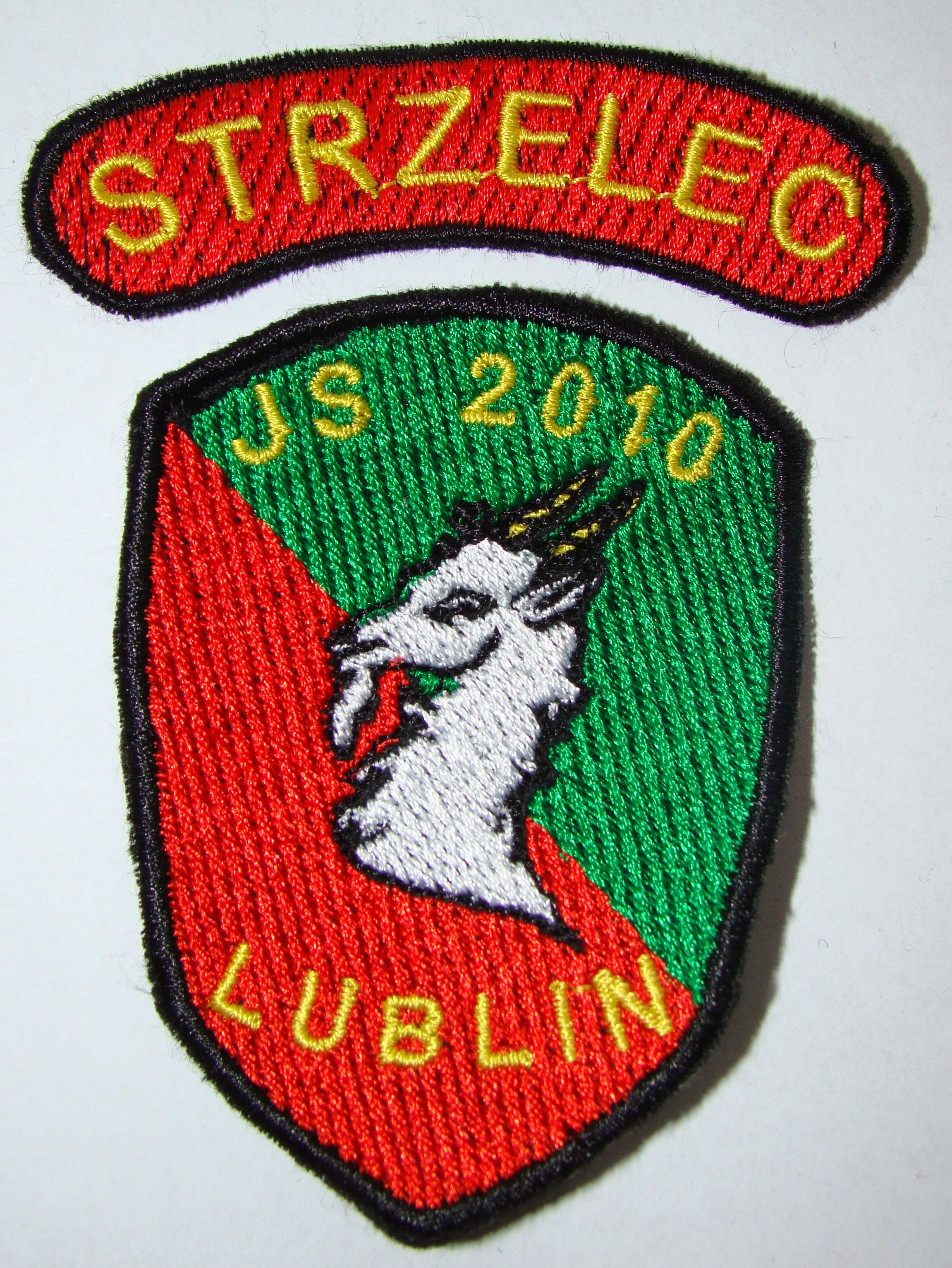 Oznaka rozpoznawcza JS 2010 Lublin wraz z dostosowanym kolorystycznie łuczkiem "STRZELEC"